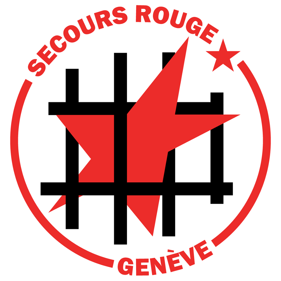 Logo du Secours Rouge Genève